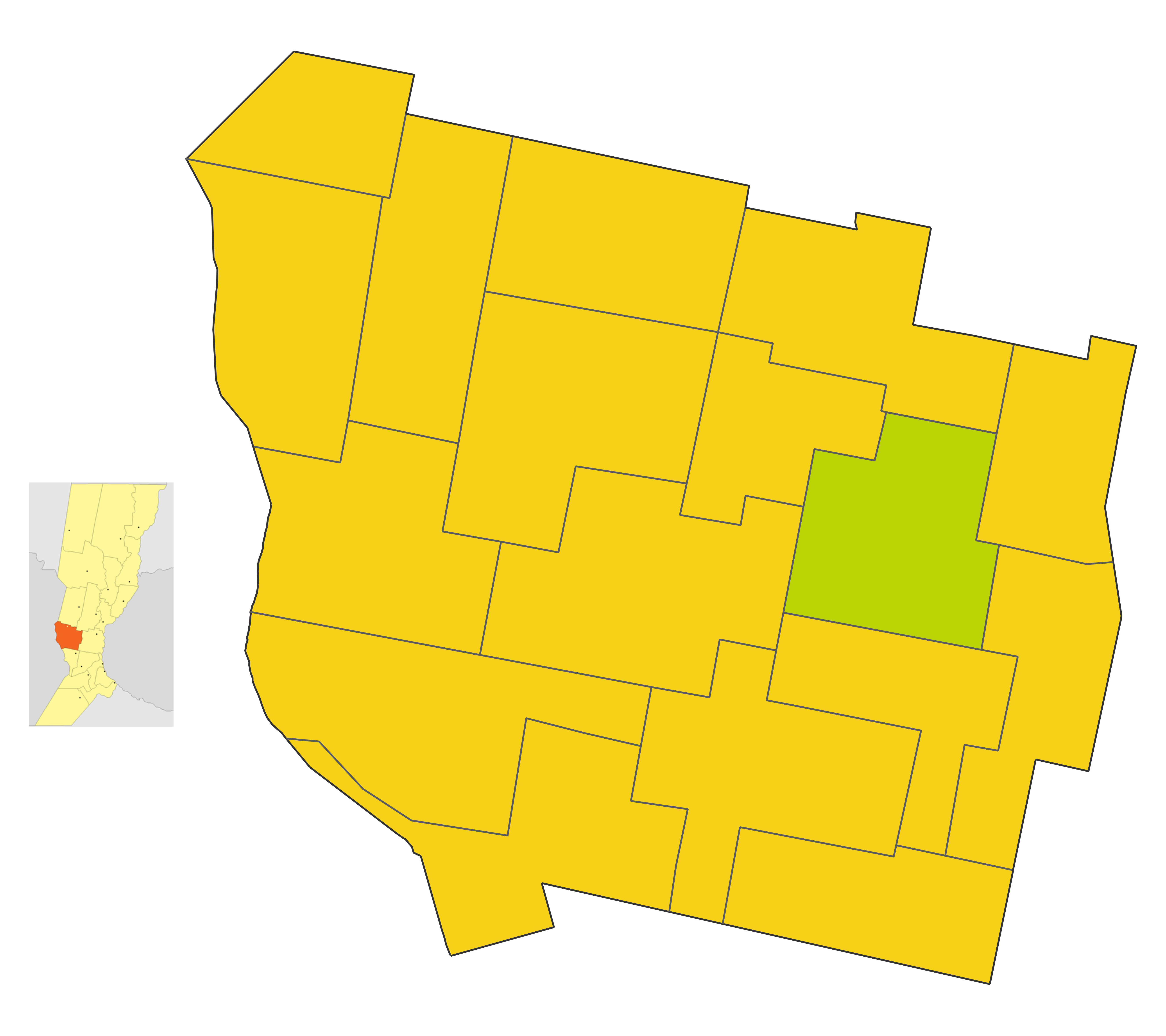 Map of the comuna de Cañada Rosquin in San Martin department, Santa Fe province, Argentina